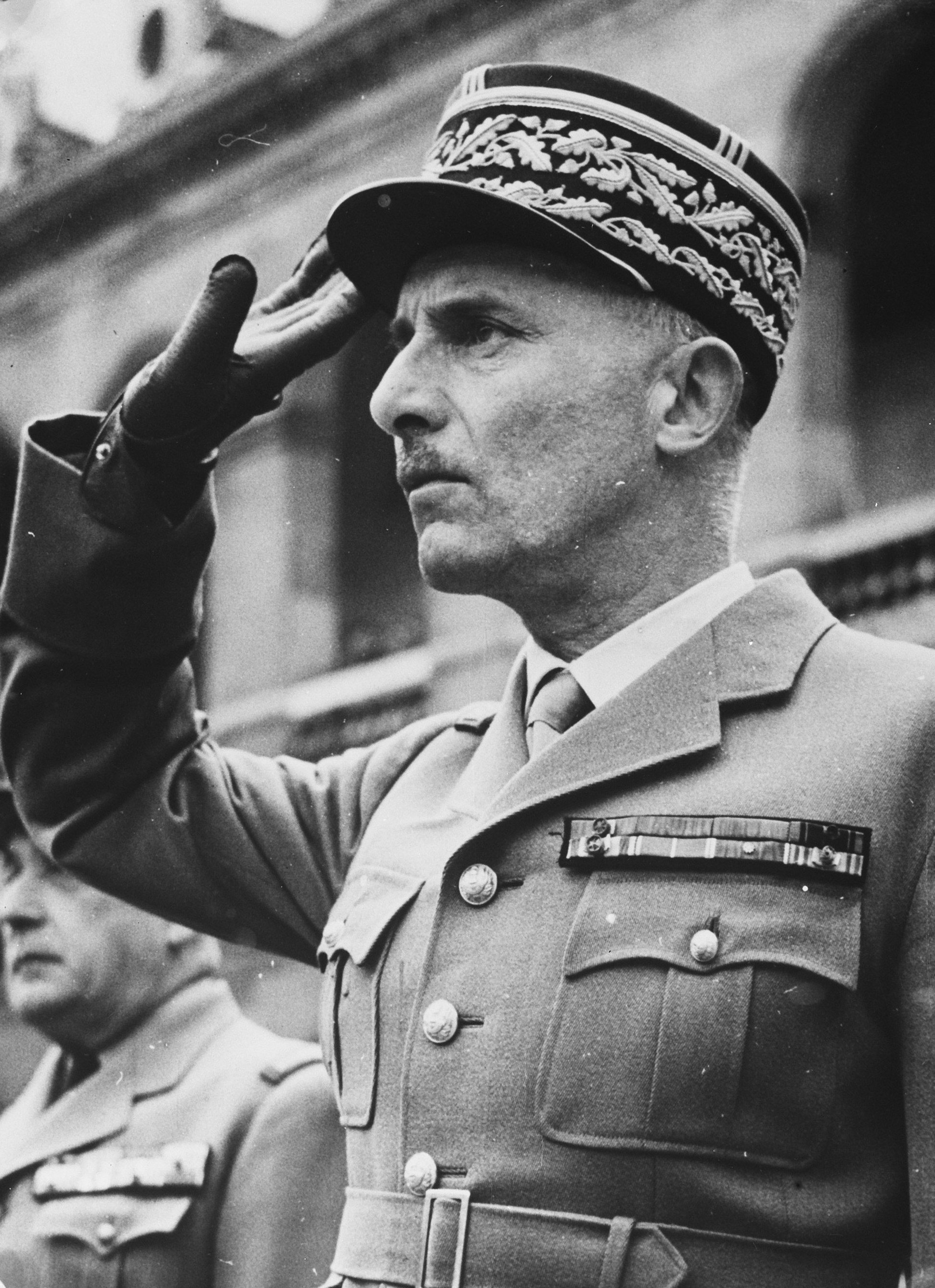 Generaal Henri Zeller (NIET: André Zeller)